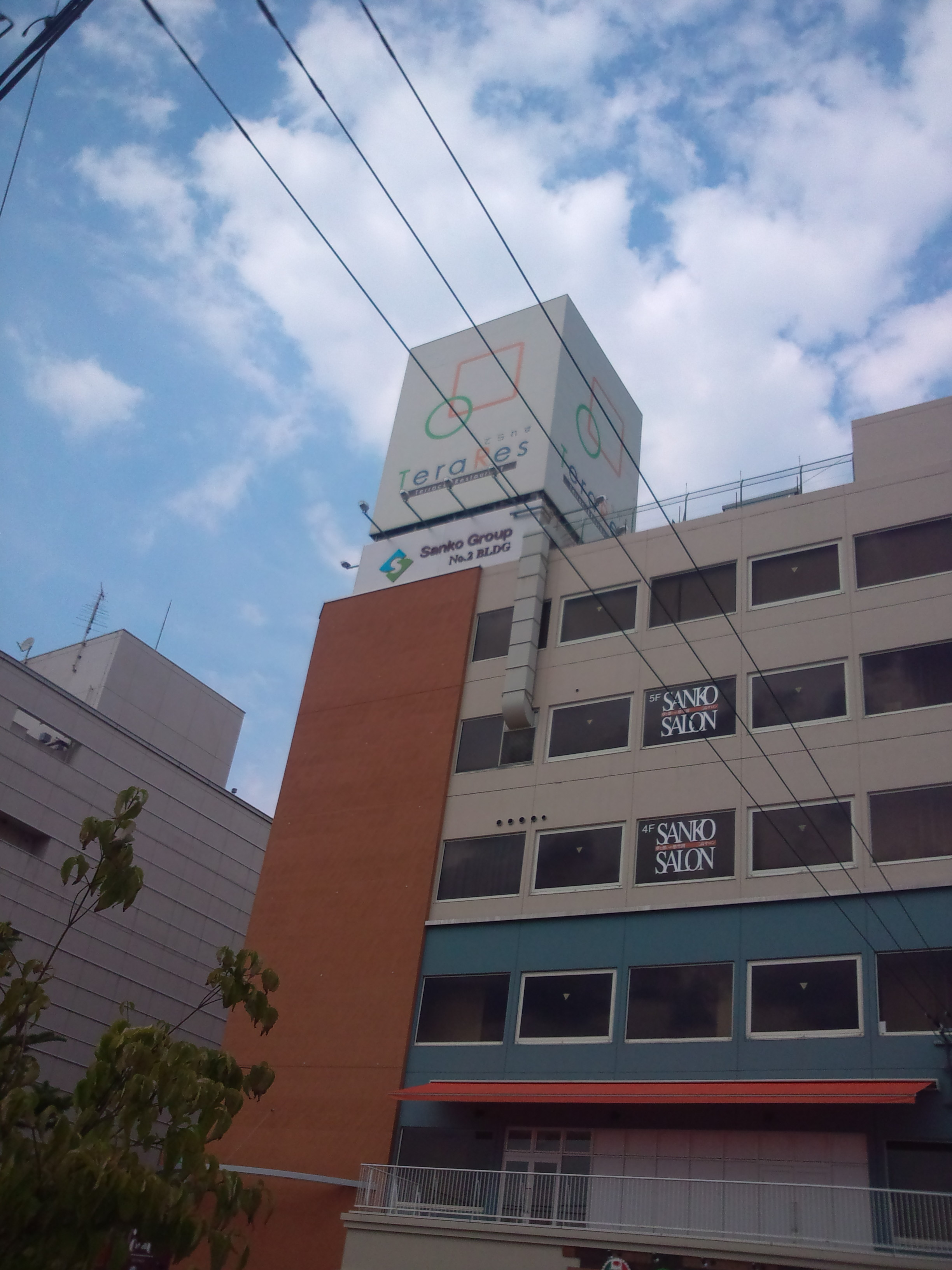 三高第二ビルてられす久喜